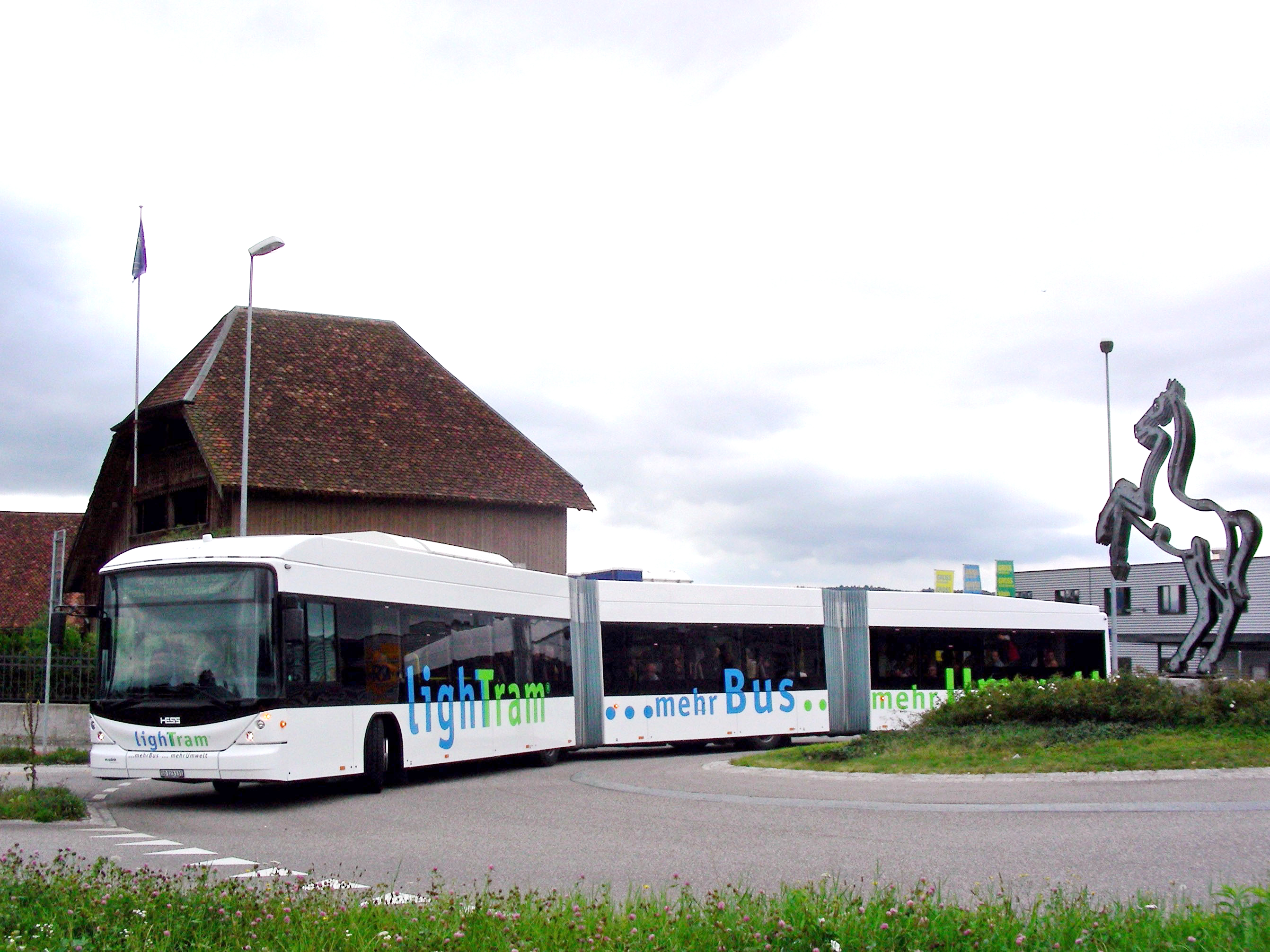 Der LighTram hybrid Prototyp von Hess unterwegs in Bellach(SO), Schweiz